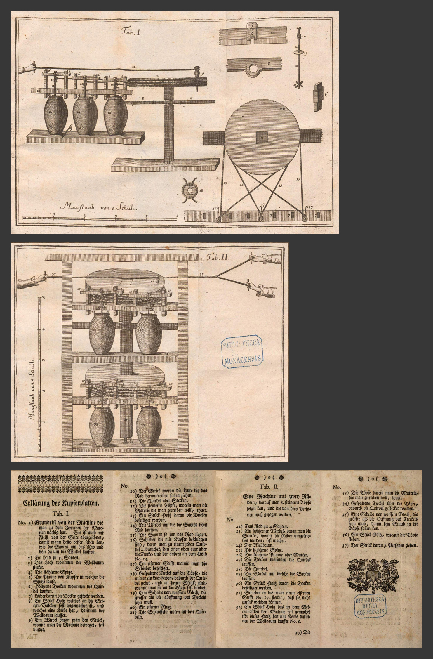 Abbildung von Laborgeräten